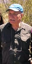 Profesor, ingeniero agrónomo, y botánico argentino.